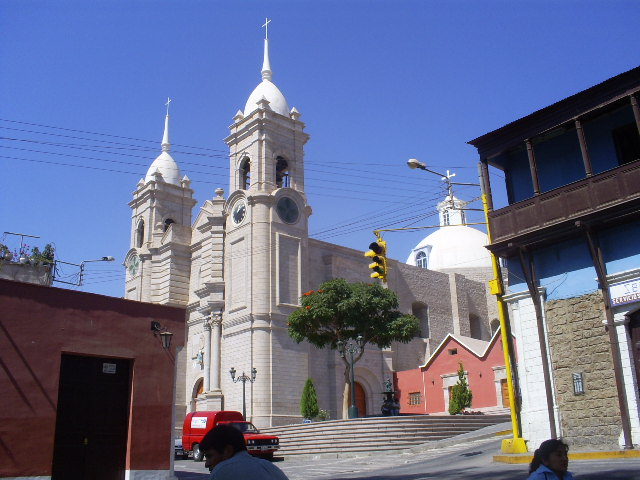 Complejo Santo Domingo de la ciudad de Moquegua